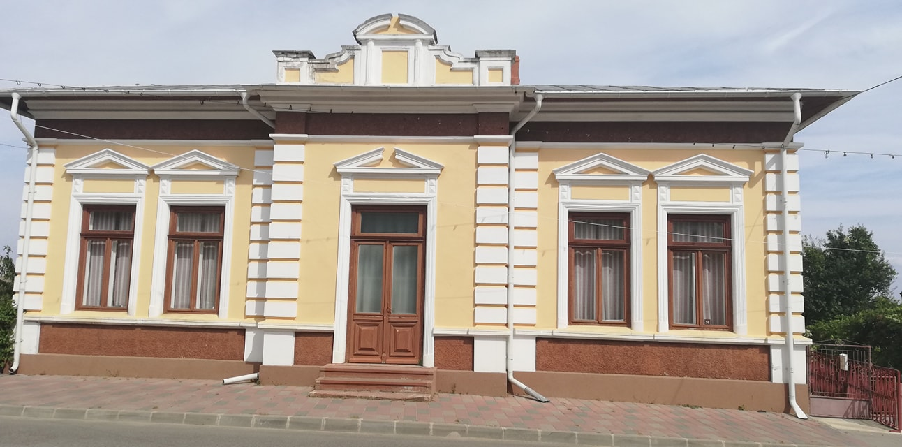 Casa dateaza din anul 1828 si este situata pe strada Grigore Ghica56,Dorohoi